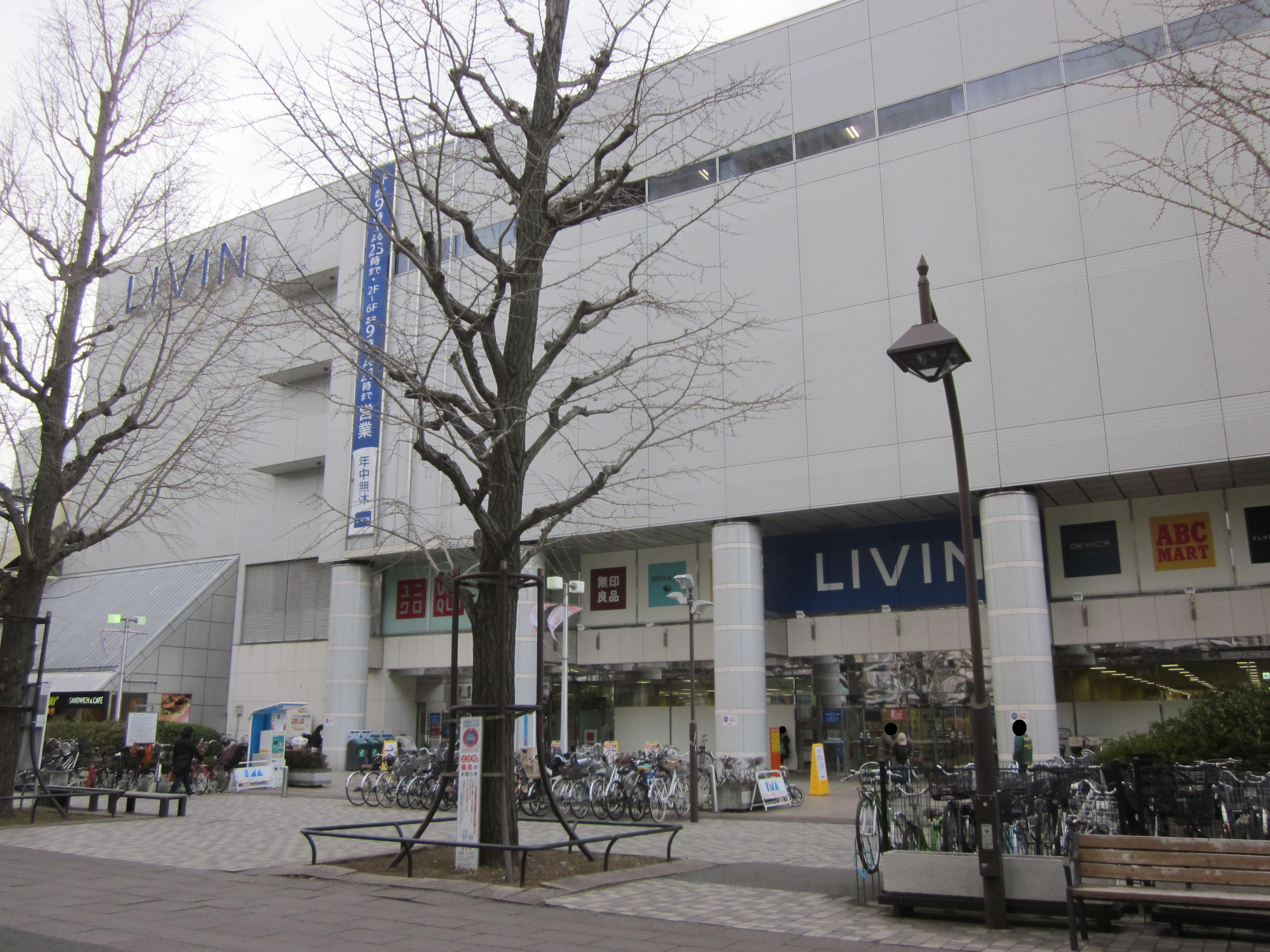 利用者:Ik06自身が撮影。